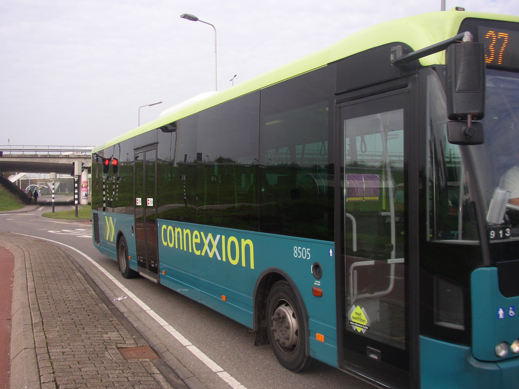 Bus 37 bij het Transferium in Oegstgeest (bij Leiden). Bus 37: Katwijk naar Leiden en terug.